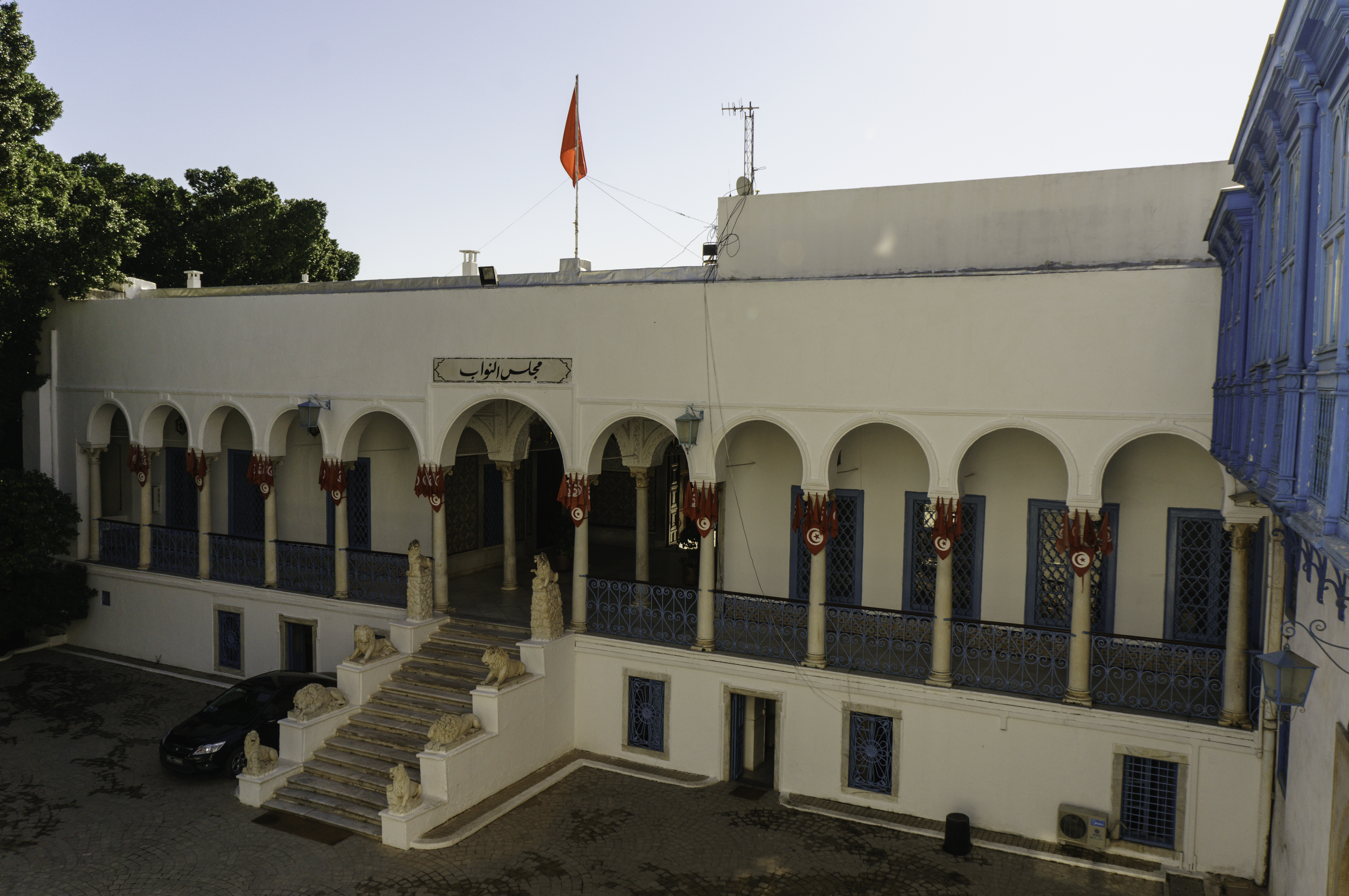 Façade du parlement tunisien dans une aile du palais du Bardo